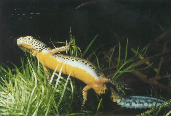 Mesotriton alpestris